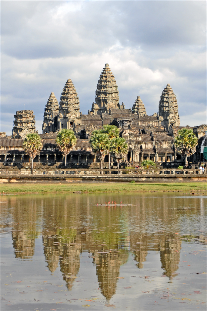 Façade ouest d'Angkor Vat Angkor Vat est un temple d'Etat construit au XIIè siècle par le roi Suryavarman II. Il est dédié au Dieu Vishnu. Il constitue l'apogée de l'art khmer. Angkor Vat signifie "capitale monastère". C'est le monument le mieux conservé de tous les monuments khmers en raison de son occupation par des religieux depuis sa redécouverte au XVIè siècle.